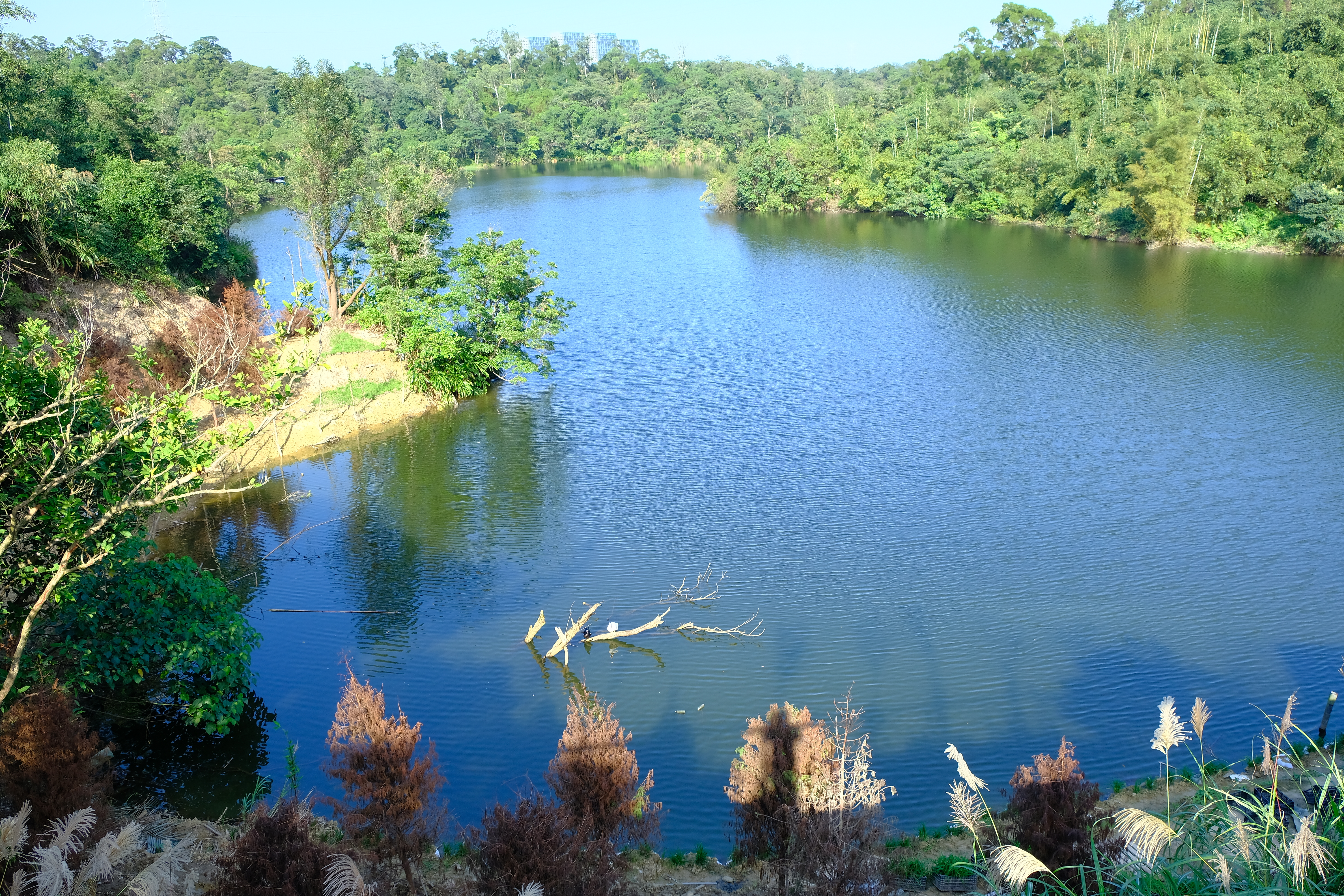 2018 BaiPaoHu Lake 新北市汐止區白匏湖